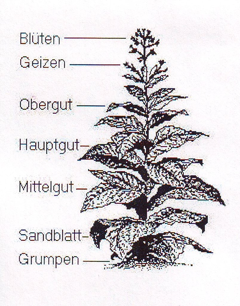 Tabakpflanze und Erntekategorien Nicotiana tabacum Sorte Burley